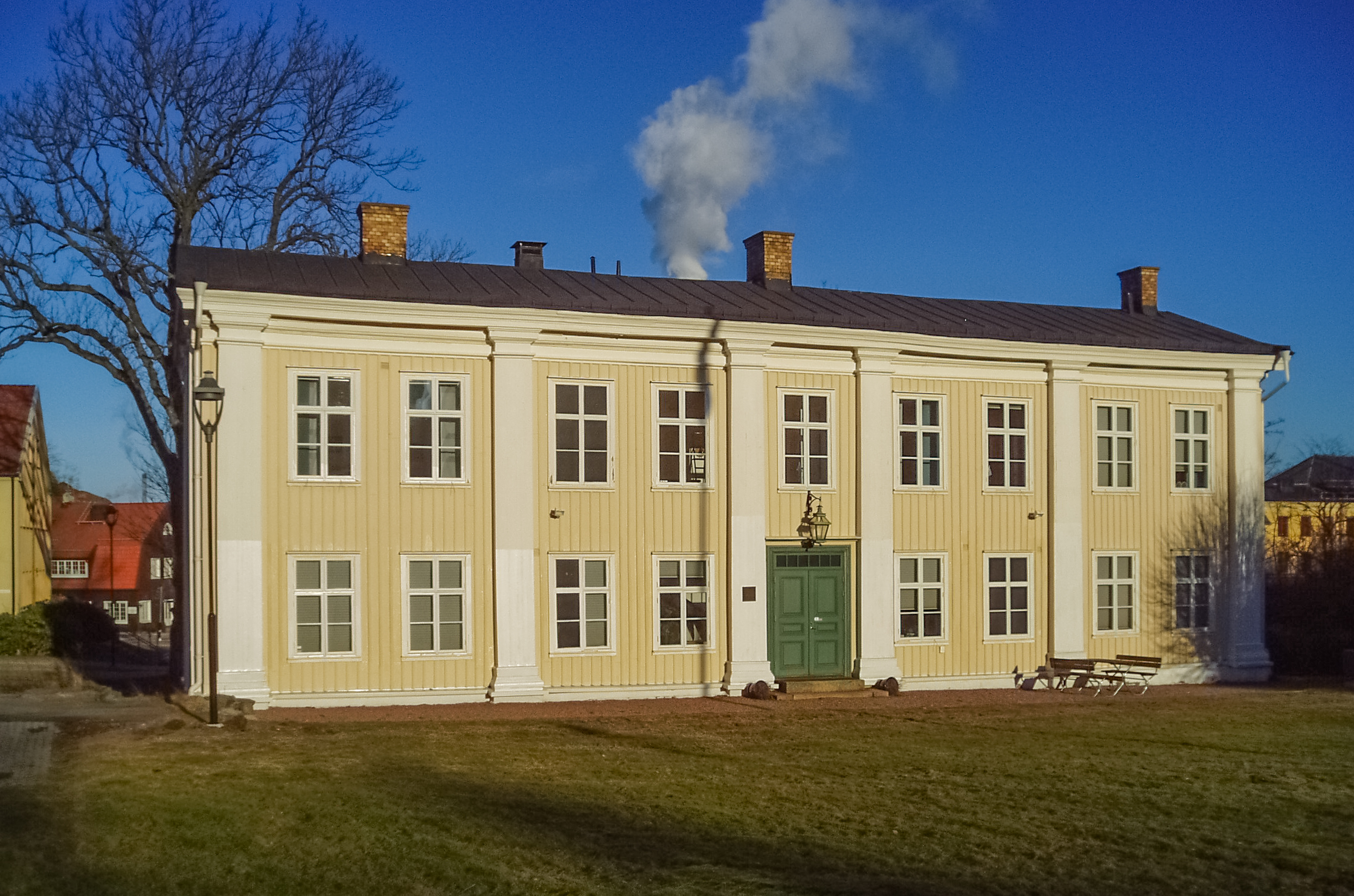 Huset "Nobis", Nya Varvet, Göteborg